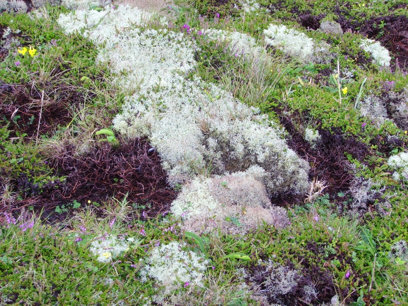 Peuplement de Cladonia (portentosa ?) sur une lande littorale, pointe du Raz (Plogoff, Finistère, France)